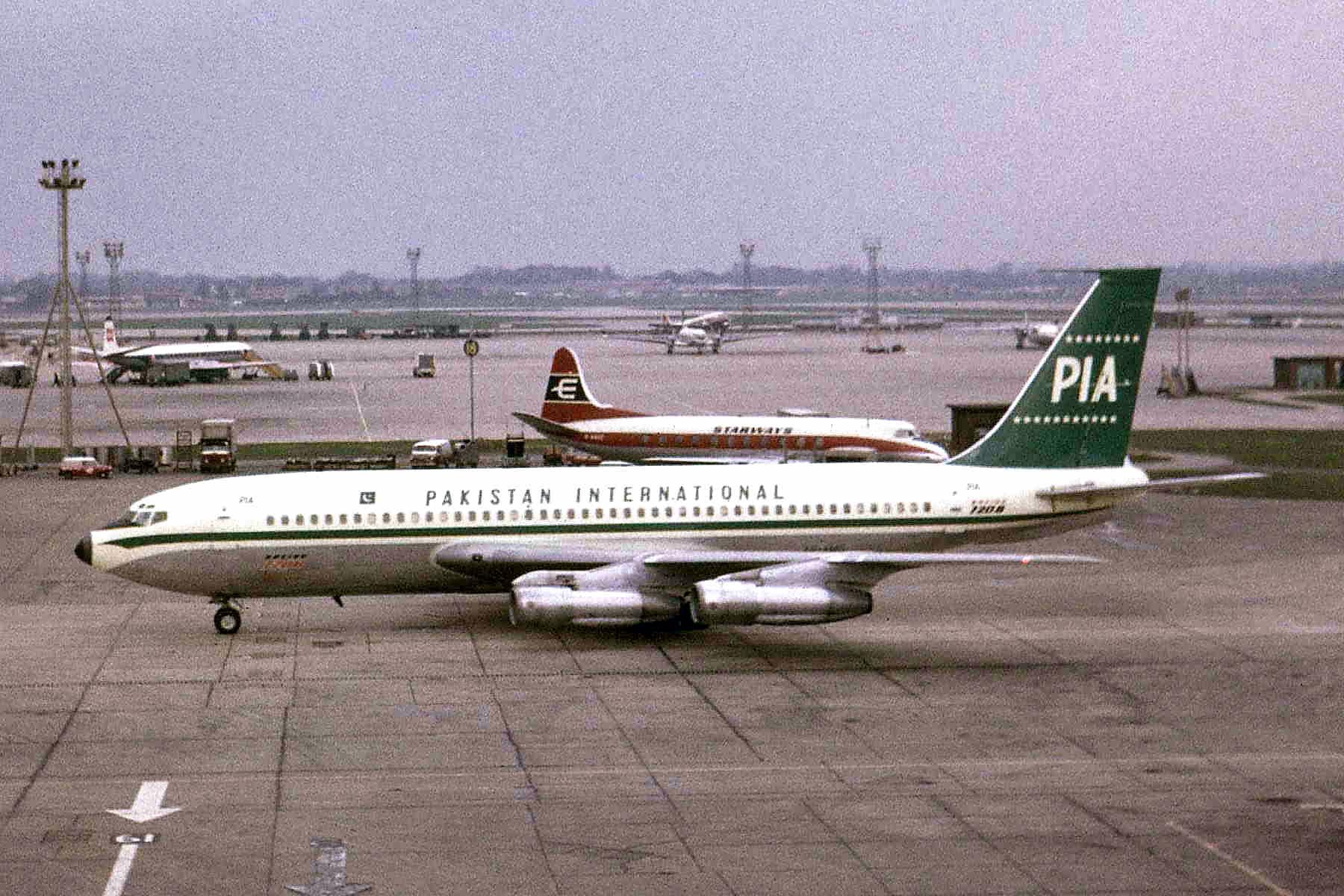 AP-AMG B720-040B PIA LHR